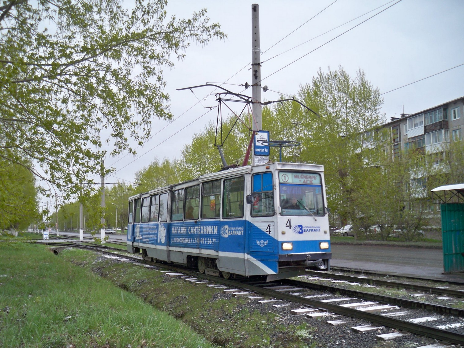 Трамвай КТМ-5 № 4 в Ачинске